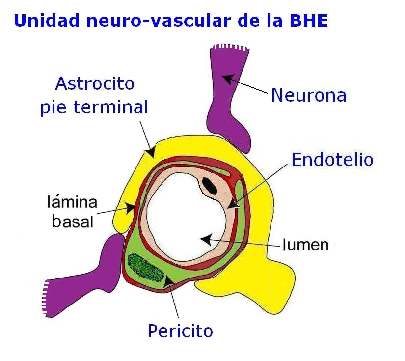 Figura 1.B.Organización de la Unidad neurovascular capilar. Sección tranversal.